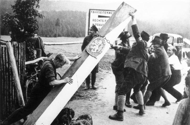 Zentralbild/CTK 19.9.1938 Nach der Unterzeichnung des Münchener Abkommens am 29.9.1938 durch Hitler, Daladier, Chamberlain und Mussolini okkupierte das faschistische Deutschland bedeutende Grenzgebiete der tschechoslowakischen Republik. UBz: wie Henlein-Faschisten (Angehörige der Nazipartei im Sudetenland) die Grenzpfähle an der deutsch-tschechoslowakischen Grenze in Erwartung des deutschen Einmarsches beseitigen. Information added by Wikimedia users.